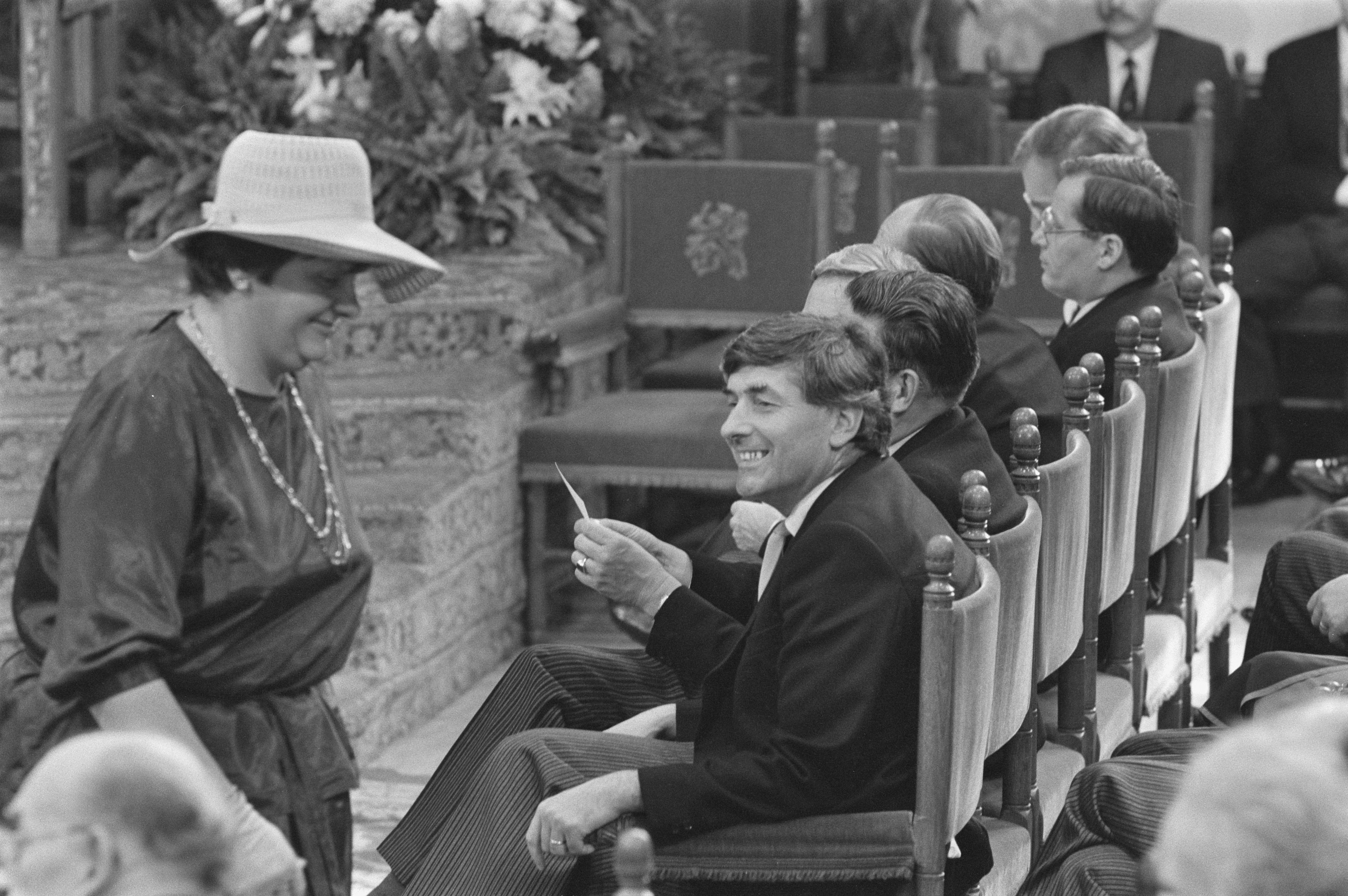 Collectie / Archief : Fotocollectie Anefo Reportage / Serie : Prinsjesdag Beschrijving : Ministers bij het voorlezen van de troonrede. Met hoed Erica Terpstra, daarnaast Ruud Lubbers Datum : 18 september 1984 Trefwoorden : prinsjesdag, troonredes Fotograaf : Bogaerts, Rob / Anefo Auteursrechthebbende : Nationaal Archief Materiaalsoort : Negatief (zwart/wit) Nummer archiefinventaris : bekijk toegang 2.24.01.05 Bestanddeelnummer : 933-0821